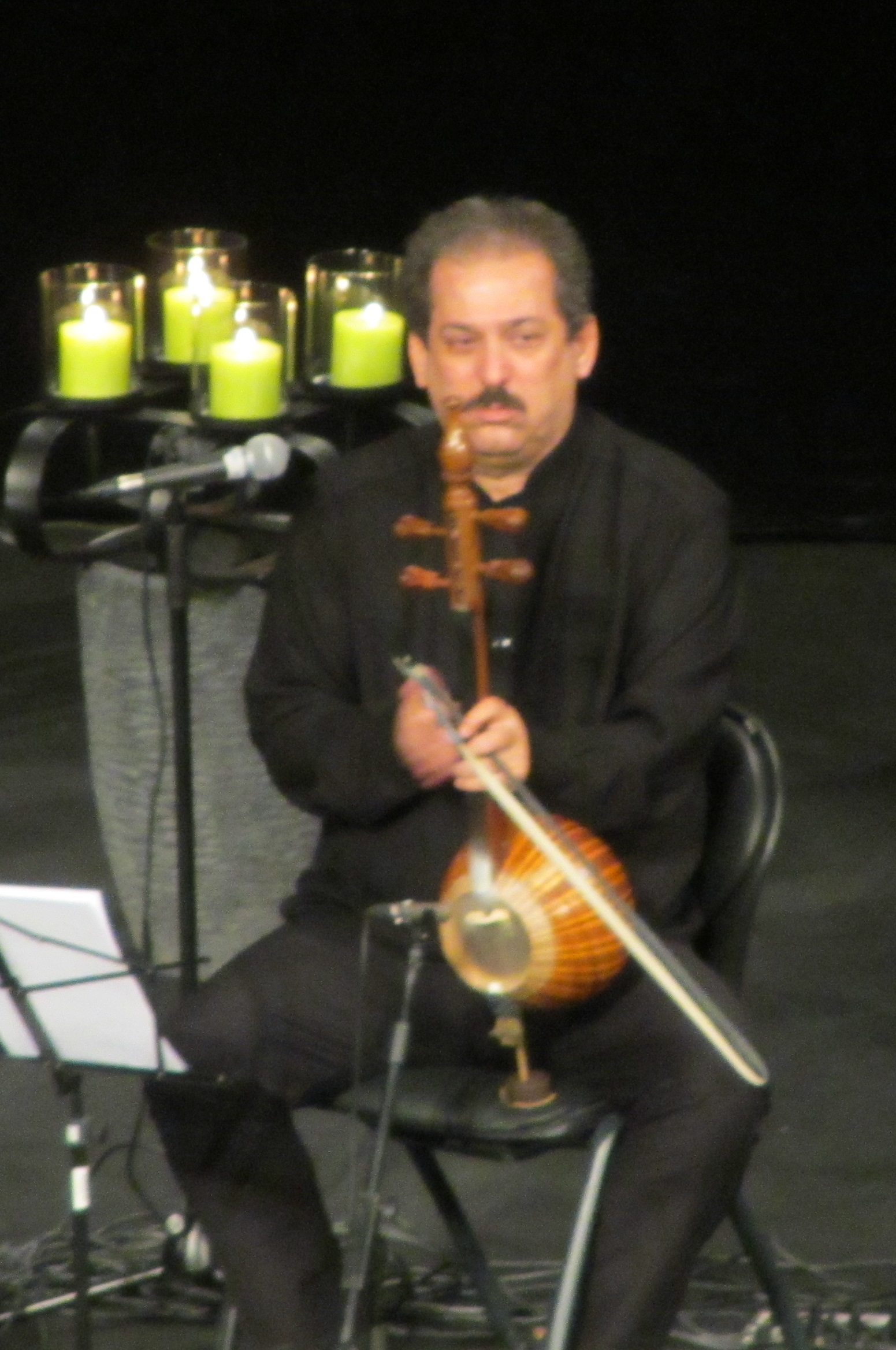 اردشیر کامکار